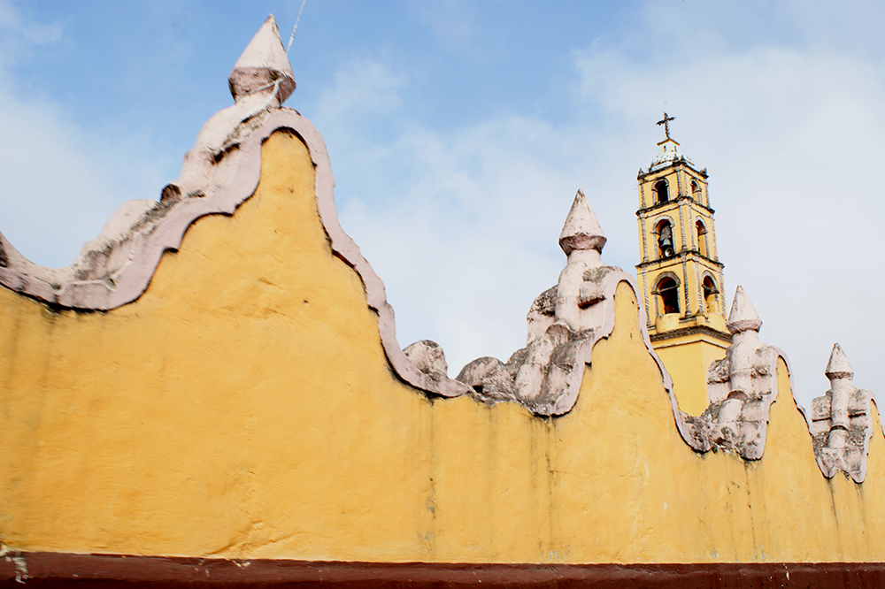 Parroquia de San Mateo